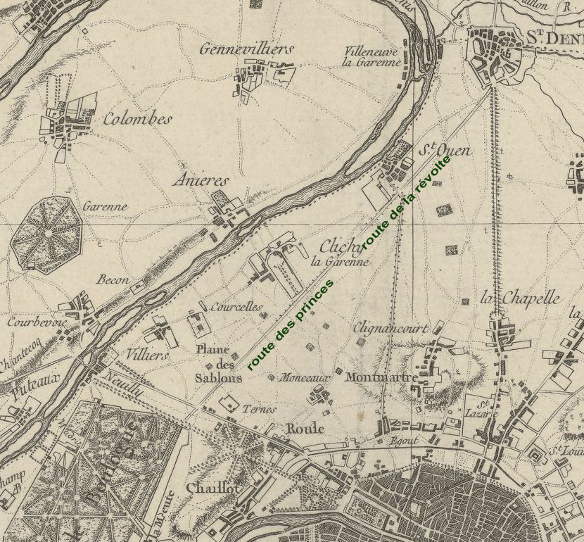 Chemin des princes qui deviendra en 1750 la route de la Révolte, sur la carte des environs de Paris,dressée par le Sr Roussel et le Sr Le Rouge en 1730 (Gallica). itinéraire anoté en superposition